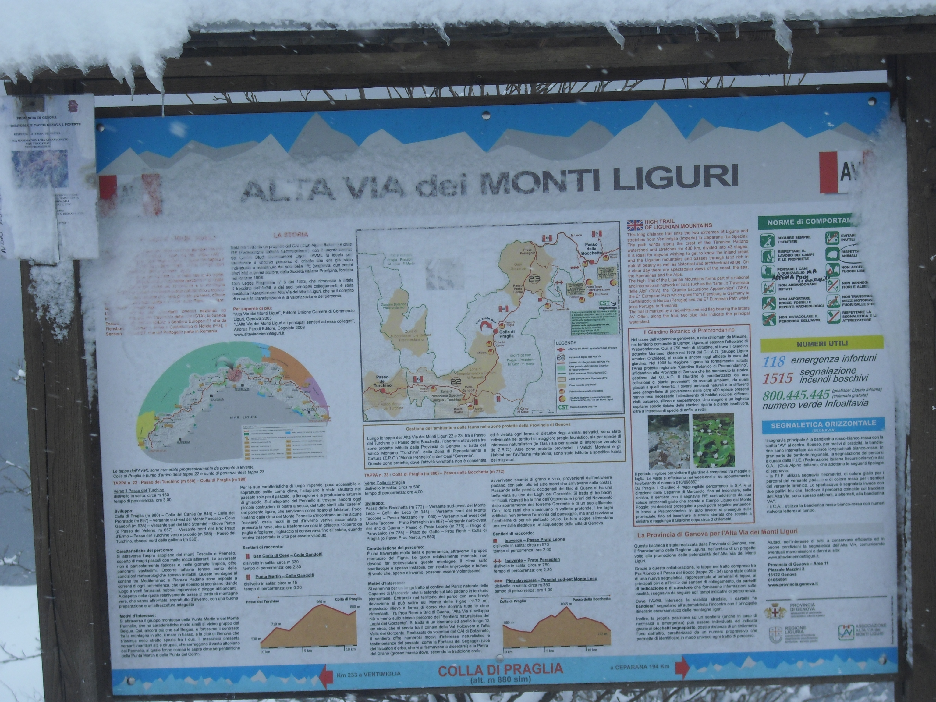 neve ai piani di praglia